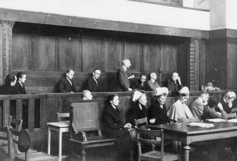 ADN/Illus Todesstrafe im Dresdner Ärzteprozeß beantragt Die Todesstrafe und Einziehung des Vermögens zu Gunsten des Landes Sachsen beantragte der Staatsanwalt im Dresdner Ärzteprozeß gegen die Angeklagten Dr. Nitsche, Dr. Langer, Dr. Herzer, Dr. Leonhardt, die Oberschwester Sachse, die Schwestern Puschmann, Klara Friedrich und Ackermann, sowie die Pfleger Fehre und Gäbler. Die Strafen für die anderen Angeklagten stellte er in das Ermessen des Gerichts. UBz: v.l.n.r.: Schwester Buschmann, Oberschwester Sachse, Oberpfleger Gäbler, Oberpfleger Fehre, Dr. Leonhardt (stehende), Dr. Herzer, Dr. Langer, Prof. Nitsche, darunter: Schwester Ackermann, Geschwister Friedrichs, Schwester Wedel, Dr. Schultze, Frau Dr. Walter.